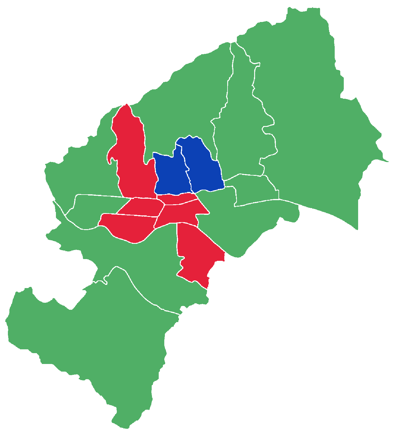 Izbori za vijeća gradskih četvrti u Zagrebu 2017. godine